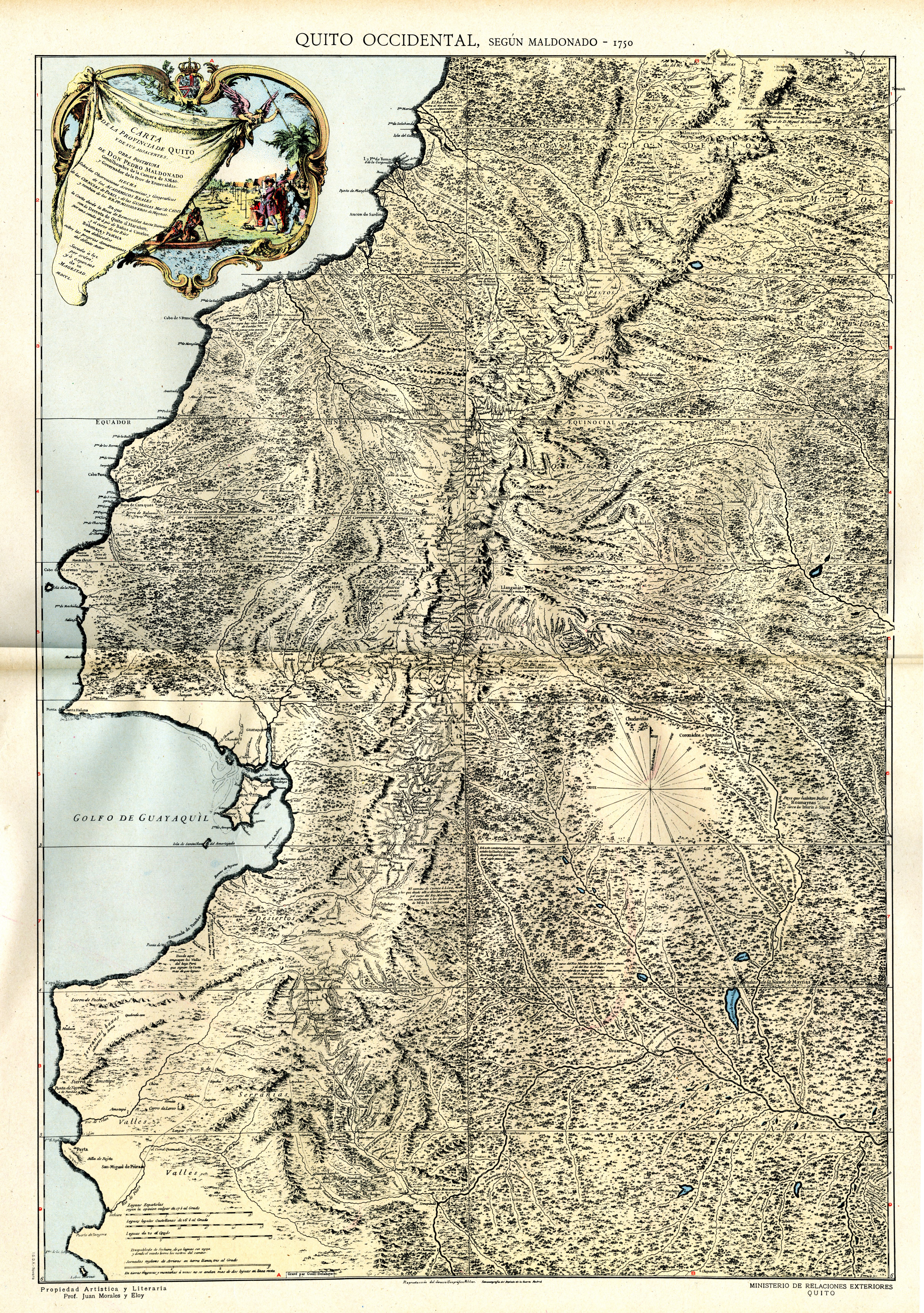 Diapositiva de Consulta y acceso publico cuya información fue investigada de un libro y/o ejemplar de revisión custodiado en los Fondos Bibliográficos y Cartográficos (Sección Siglo XVIII o Etapa Colonial) del Archivo Histórico del Guayas; Guayaquil, Ecuador.Consultado y compartido por el usuario J. Javier García A.